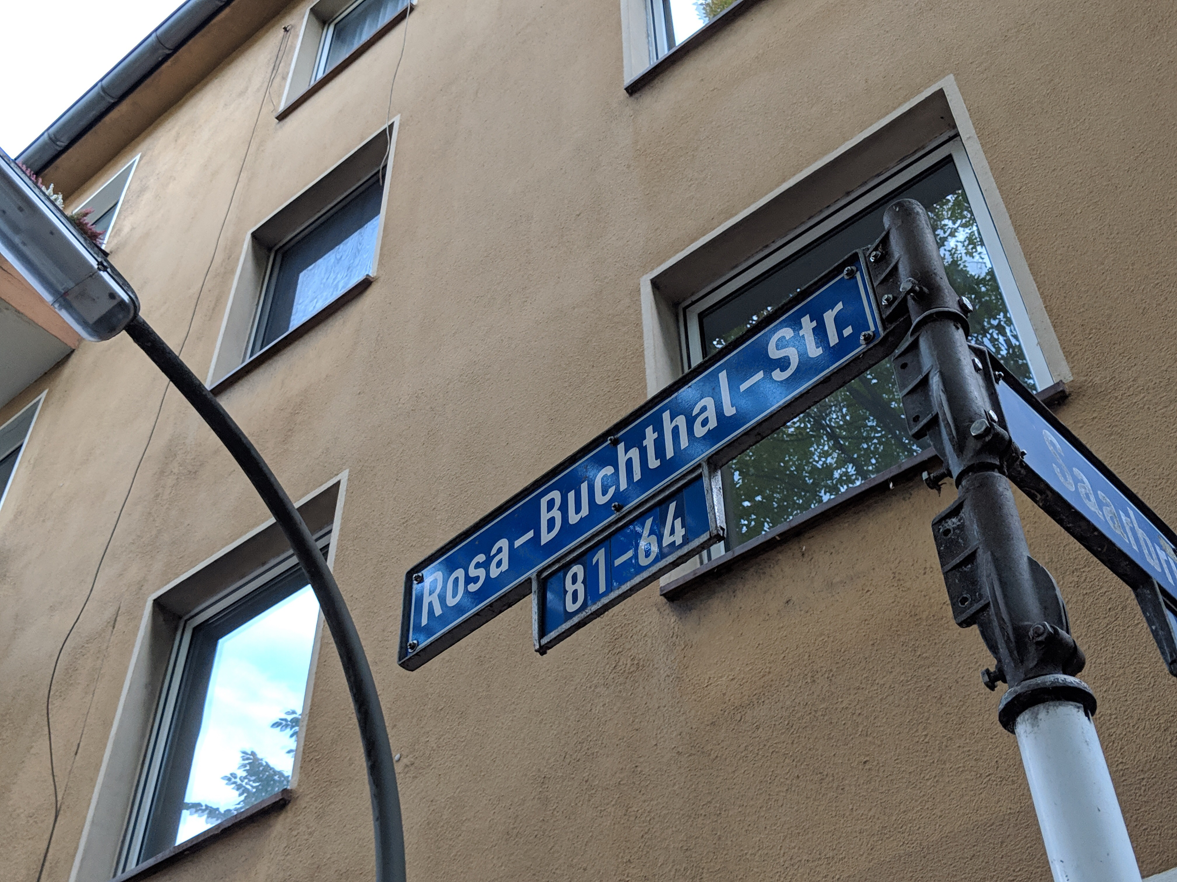 Straßenschild in der Mitte der Rosa-Buchthal-Straße im Zentrum Dortmunds. Rosa Buchthal war Anfang der 1920er Jahre die erste weibliche Stadträtin in Dortmund.